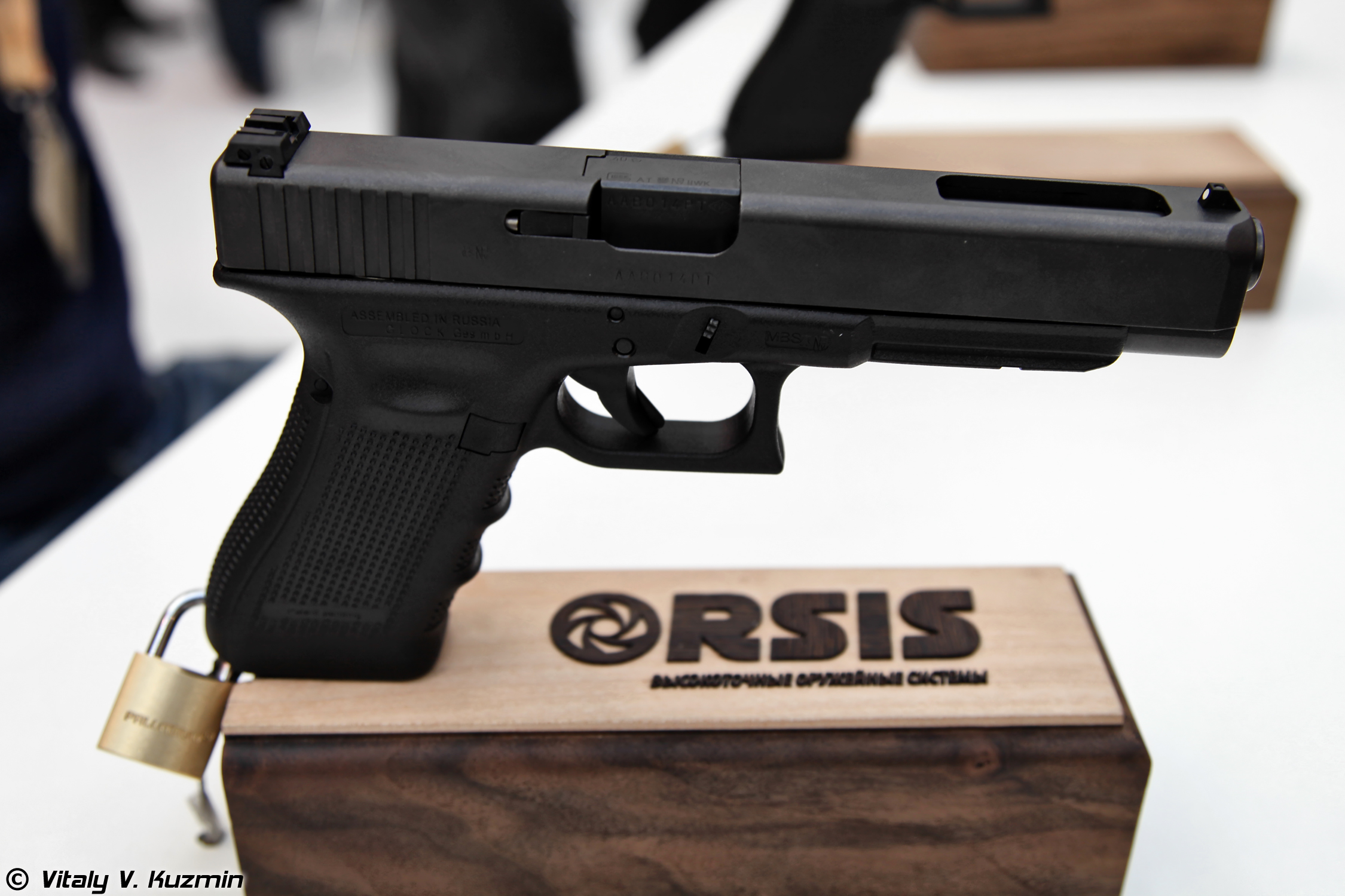 .40 Glock 35